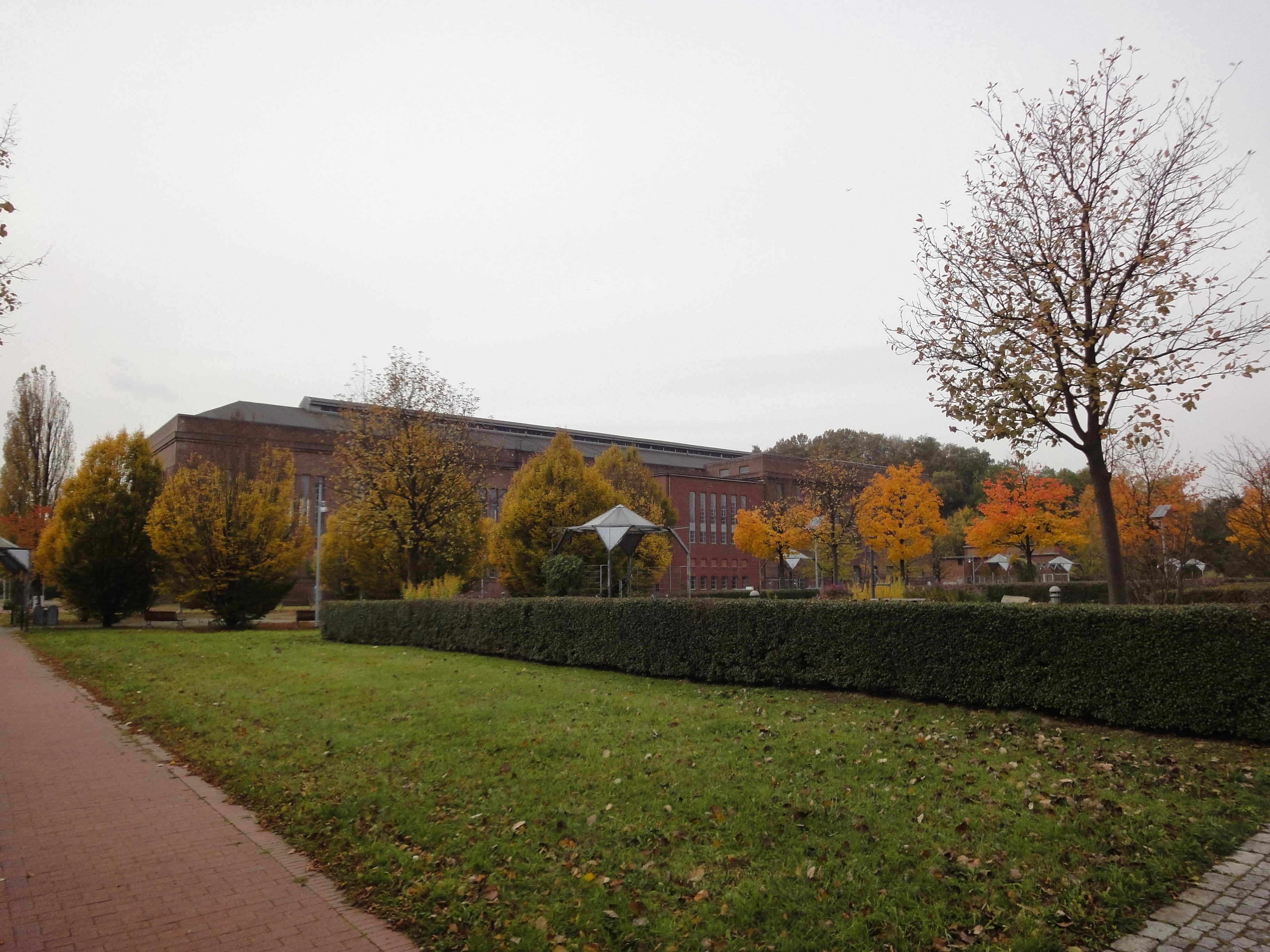 Öko-Zentrum